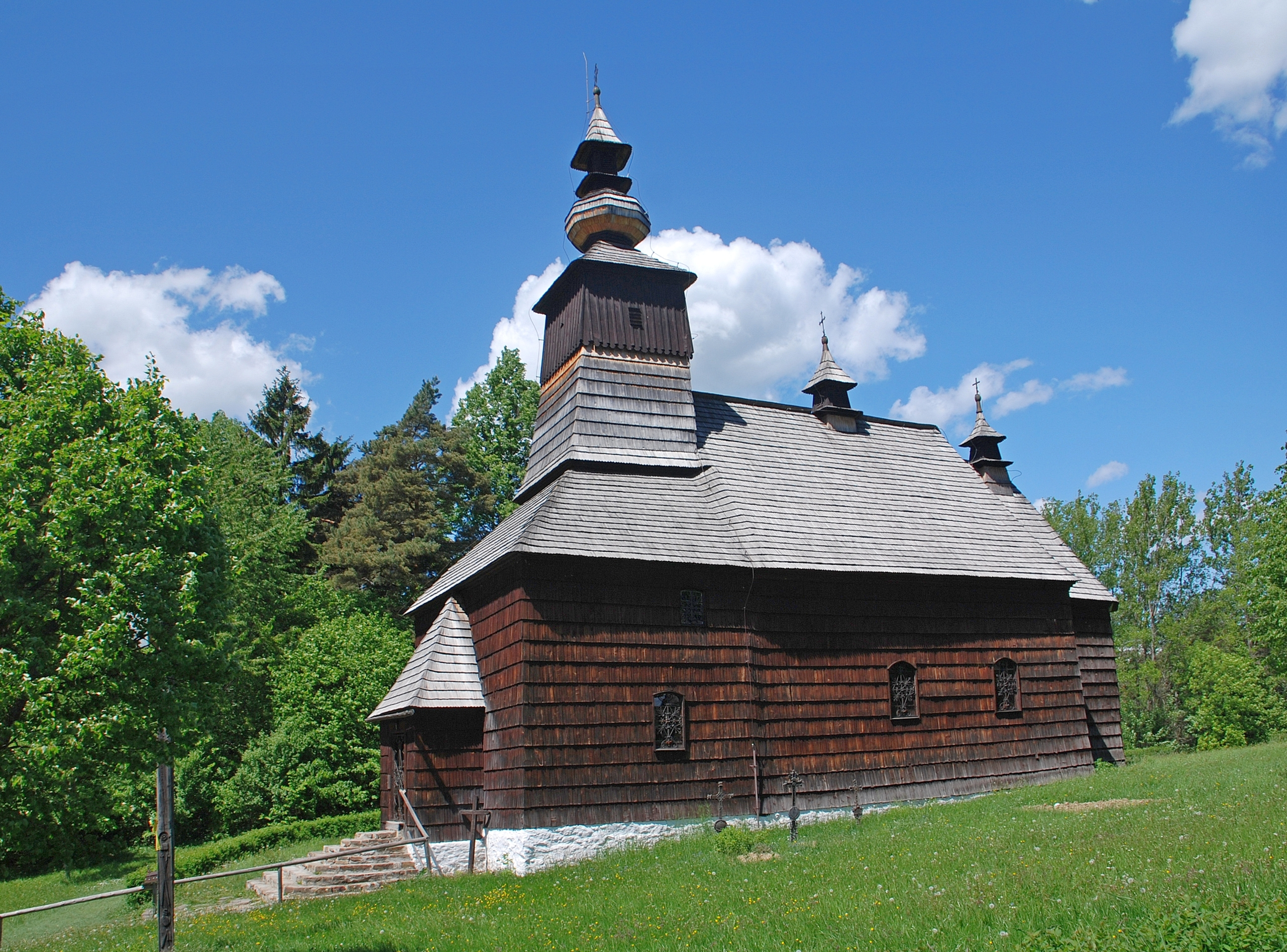 miasto Lubowla (Słowacja)